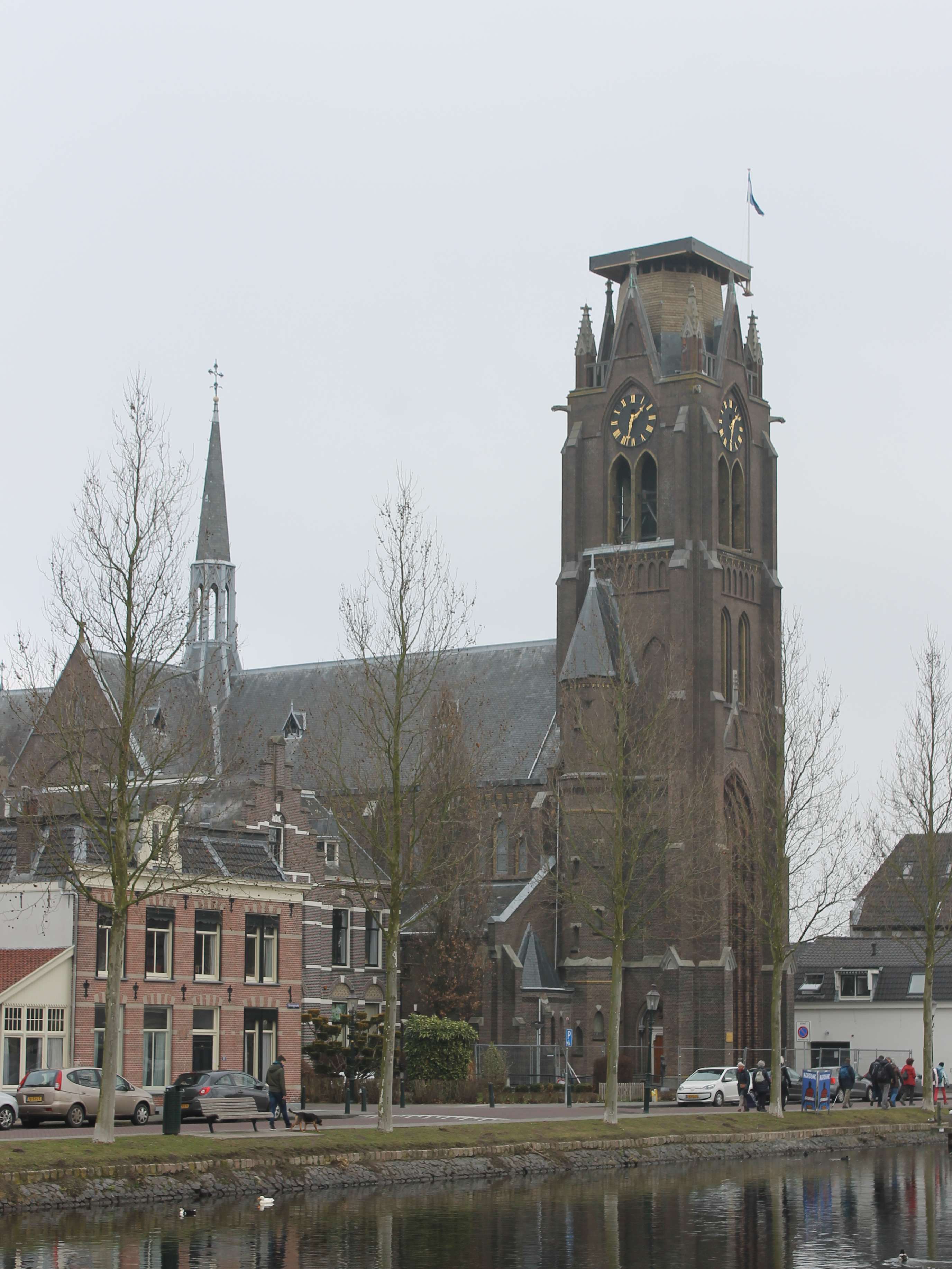 De Laurentiuskerk in Weesp, enkele maanden na de torenbrand van november 2016.